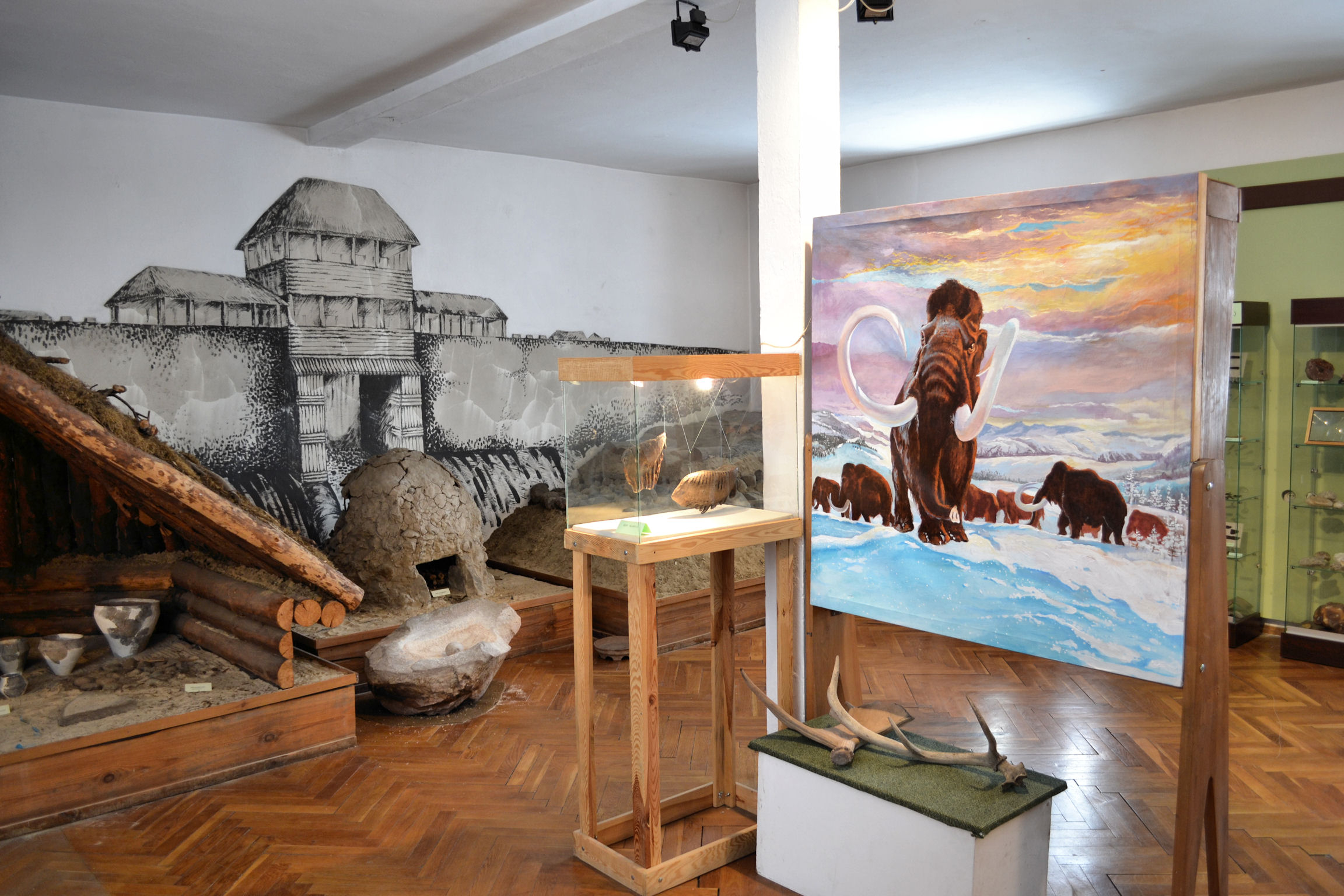 Fragment ekspozycji Muzeum Pojezierza Myśliborskiego w Myśliborzu